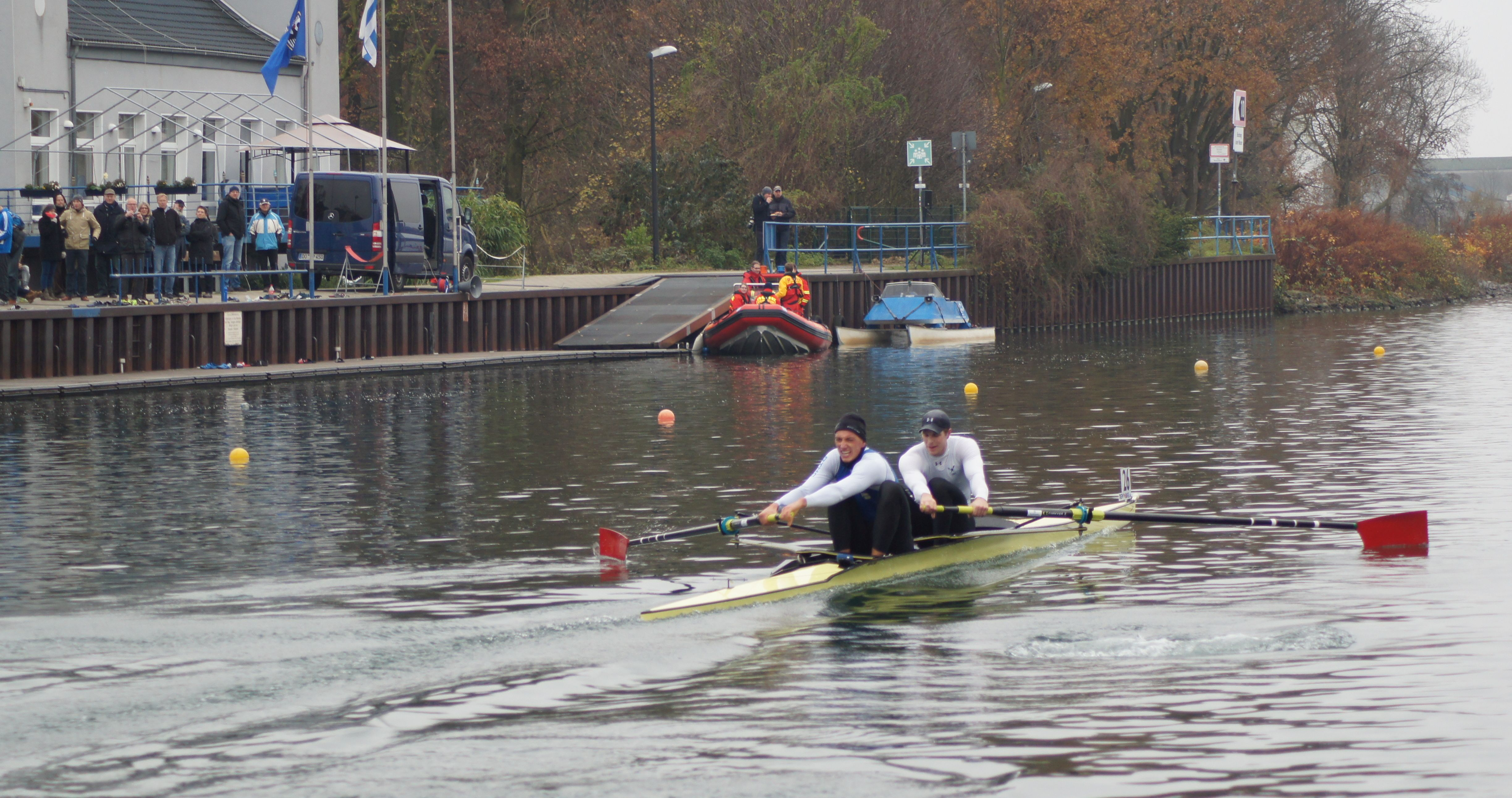 Herbst-Langstrecke 2014 am RC Hansa Dortmund. Das Bild zeigt Felix Drahotta und Richard Schmidt.